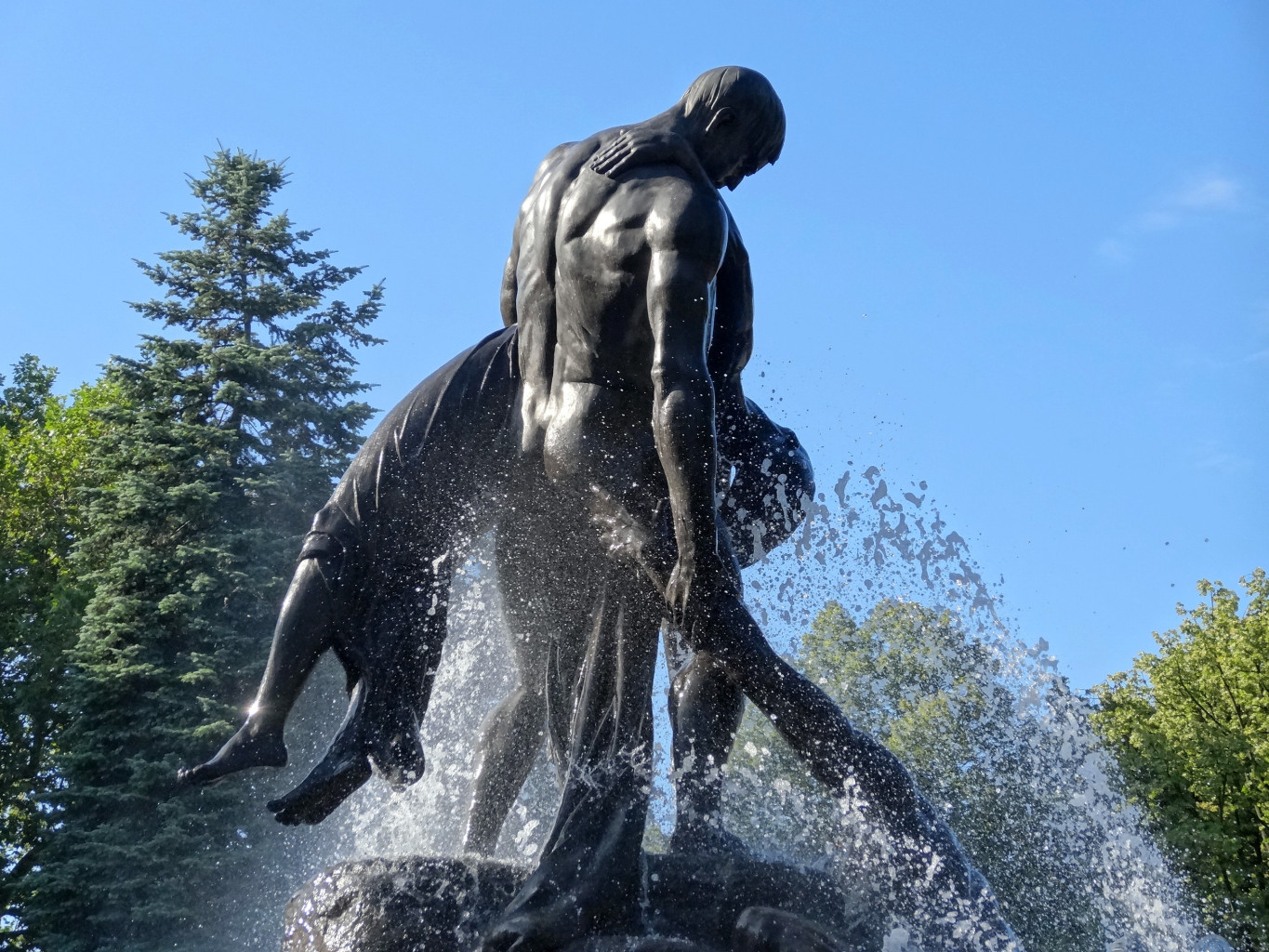 Fontanna Potop w Bydgoszczy